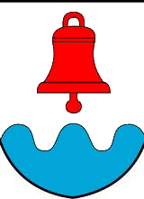 Míchov znak